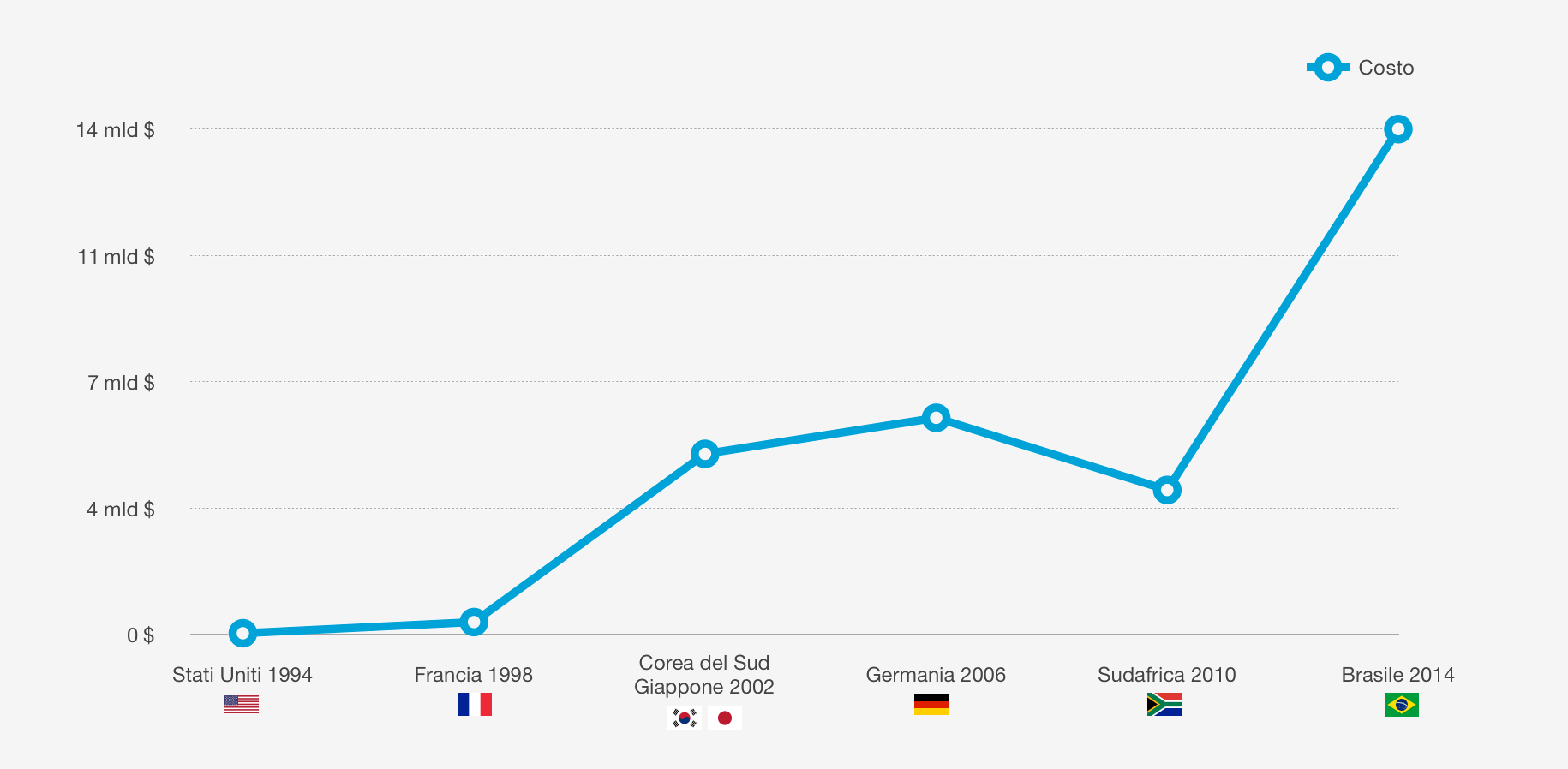 Costo ultime Coppe del Mondo FIFA (1994-2014).